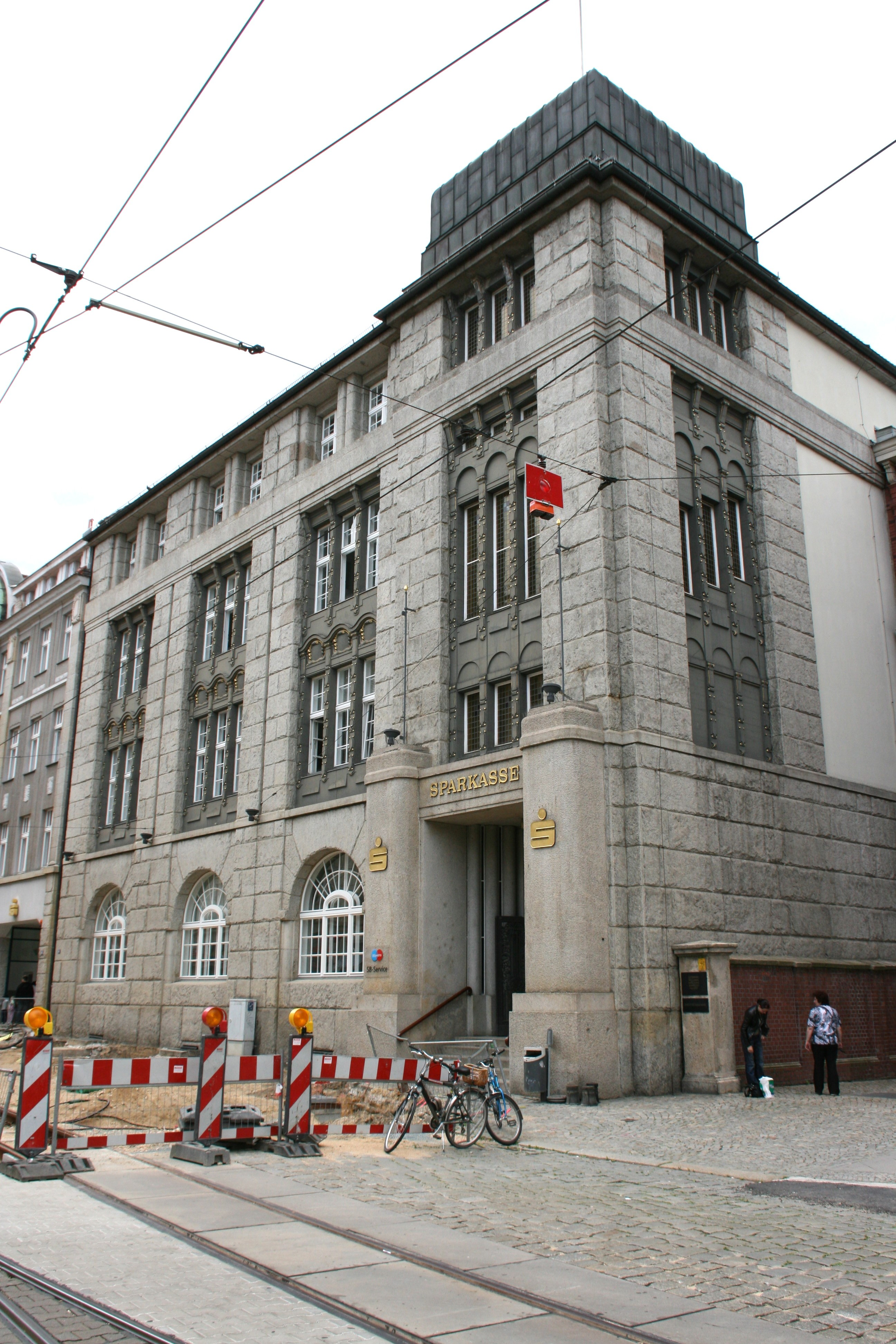 Berliner Straße in Görlitz